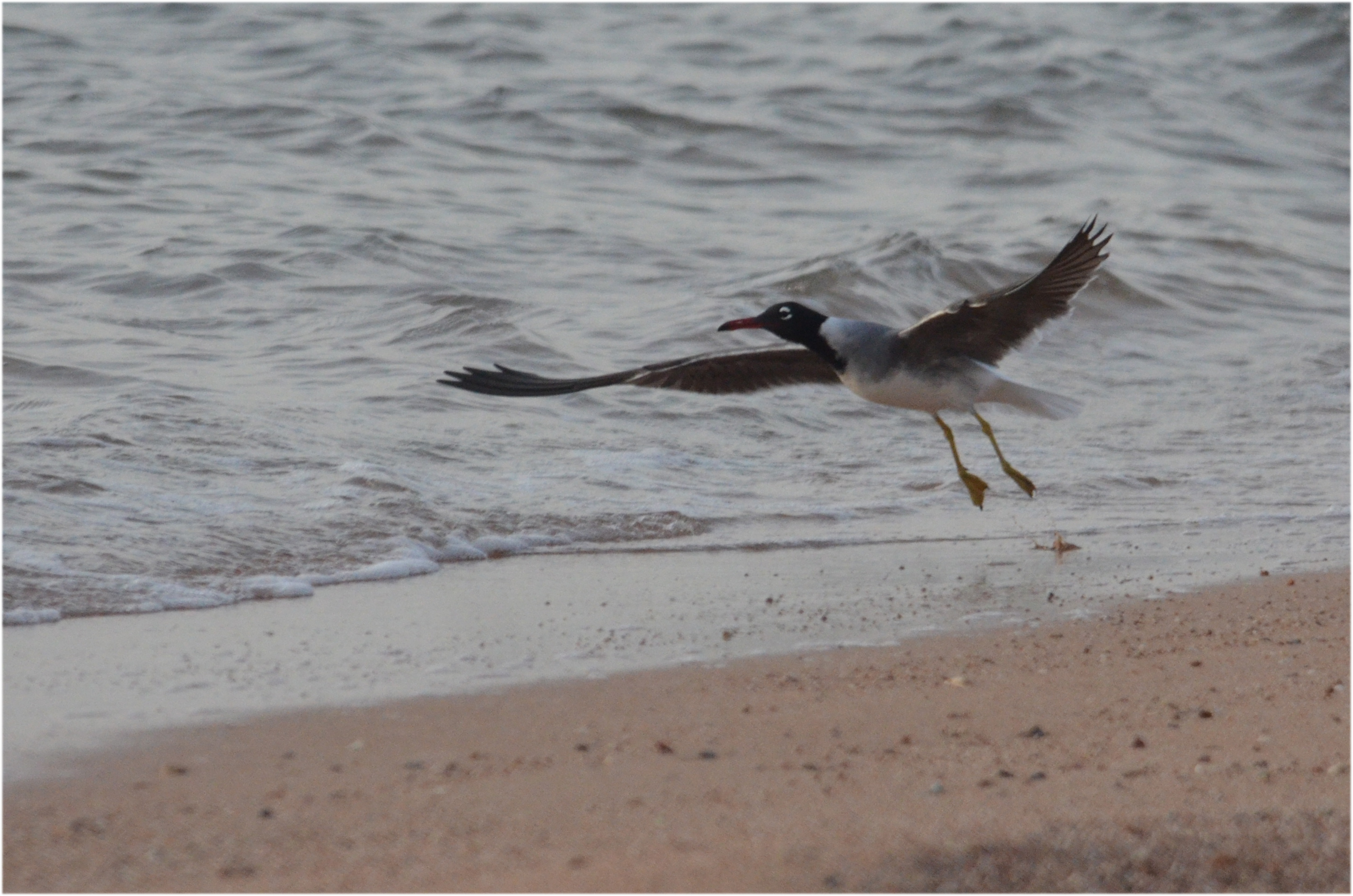 نورس أبيض العين قرب محمية نبق